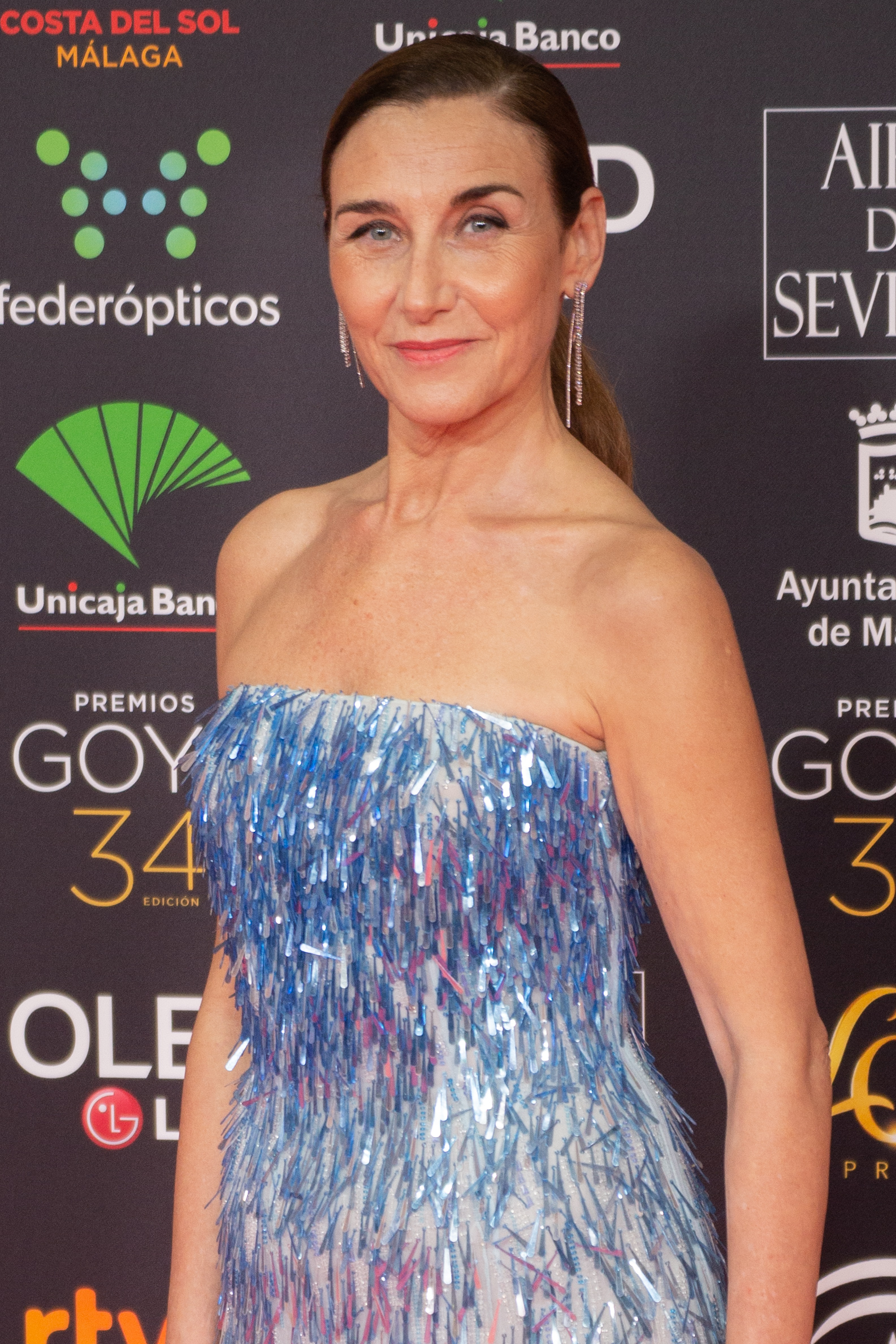 Mona Martínez en la alfombra roja de la ceremonia de entrega de los Premios Goya 2020, celebrados en Málaga